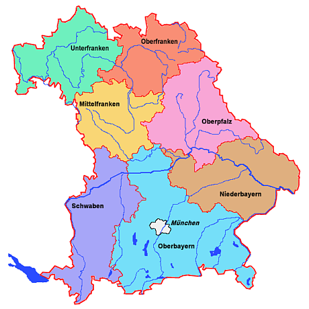 المناطق الإدارية في ولاية بافاريا.Boarisch: De boarischn Regiarungsbeziak.